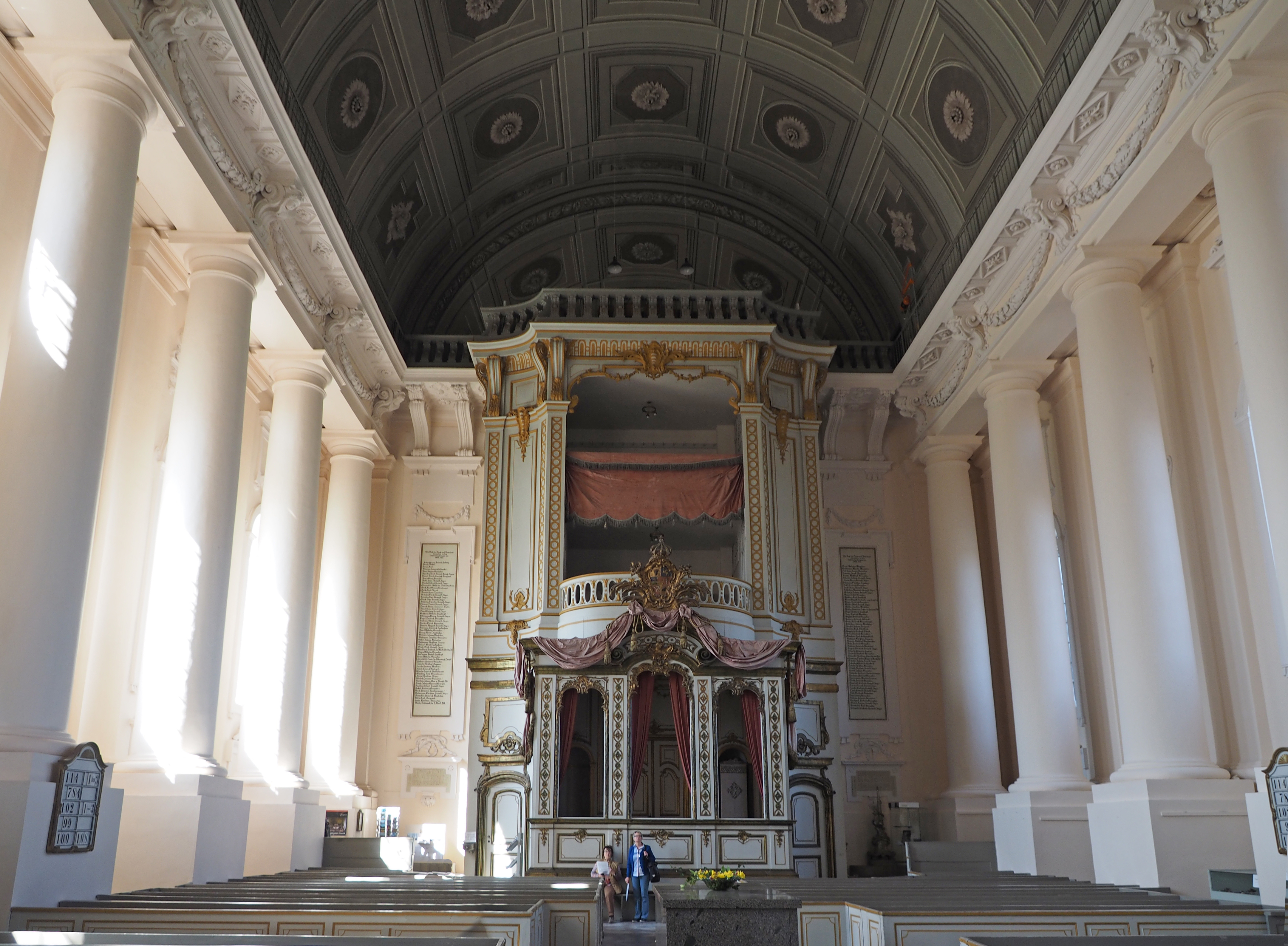 Innenraum der Stadtkirche Ludwigslust mit Fürstenloge